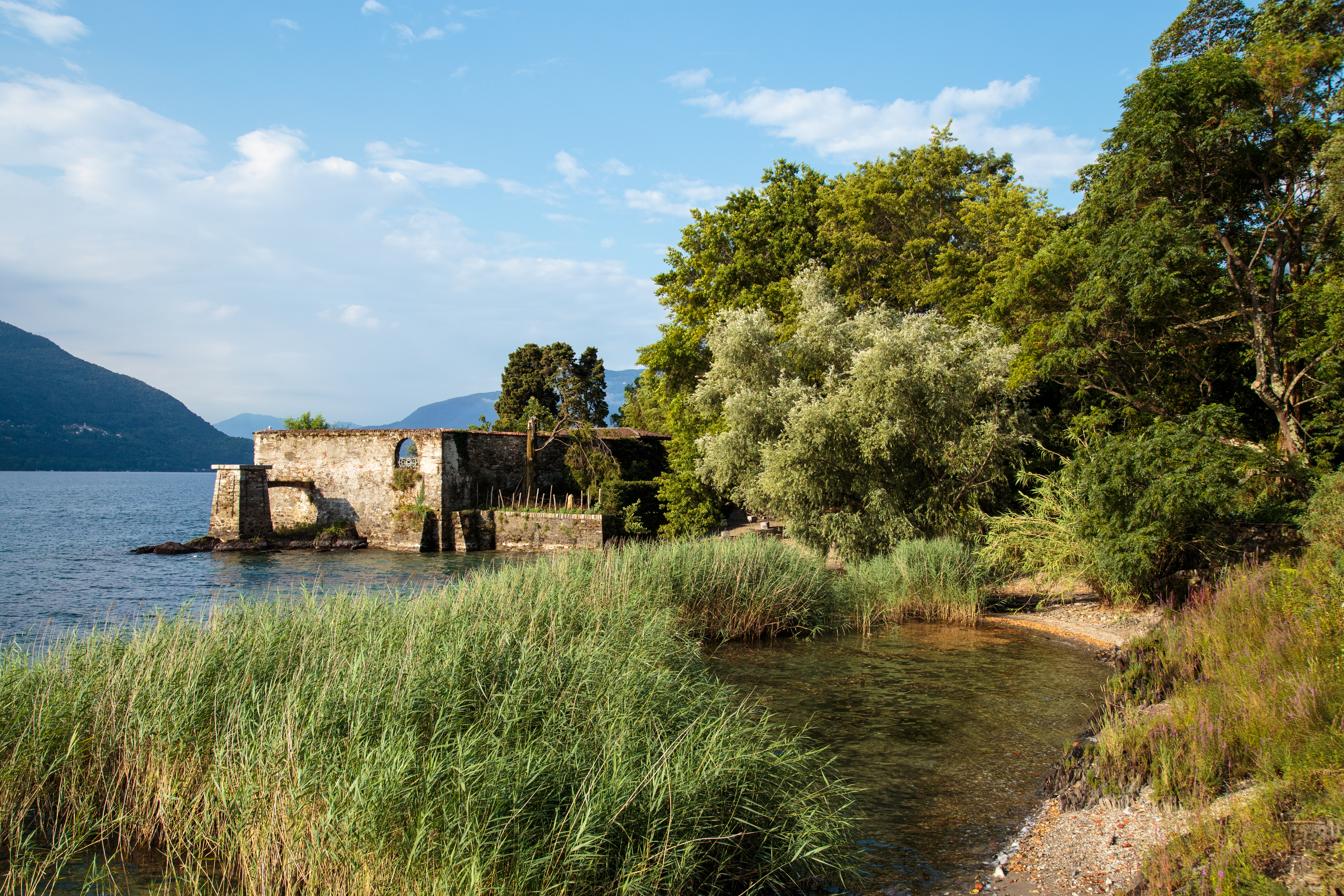 Progetto Parco Nazionale del Locarnese, Isole di Brissago